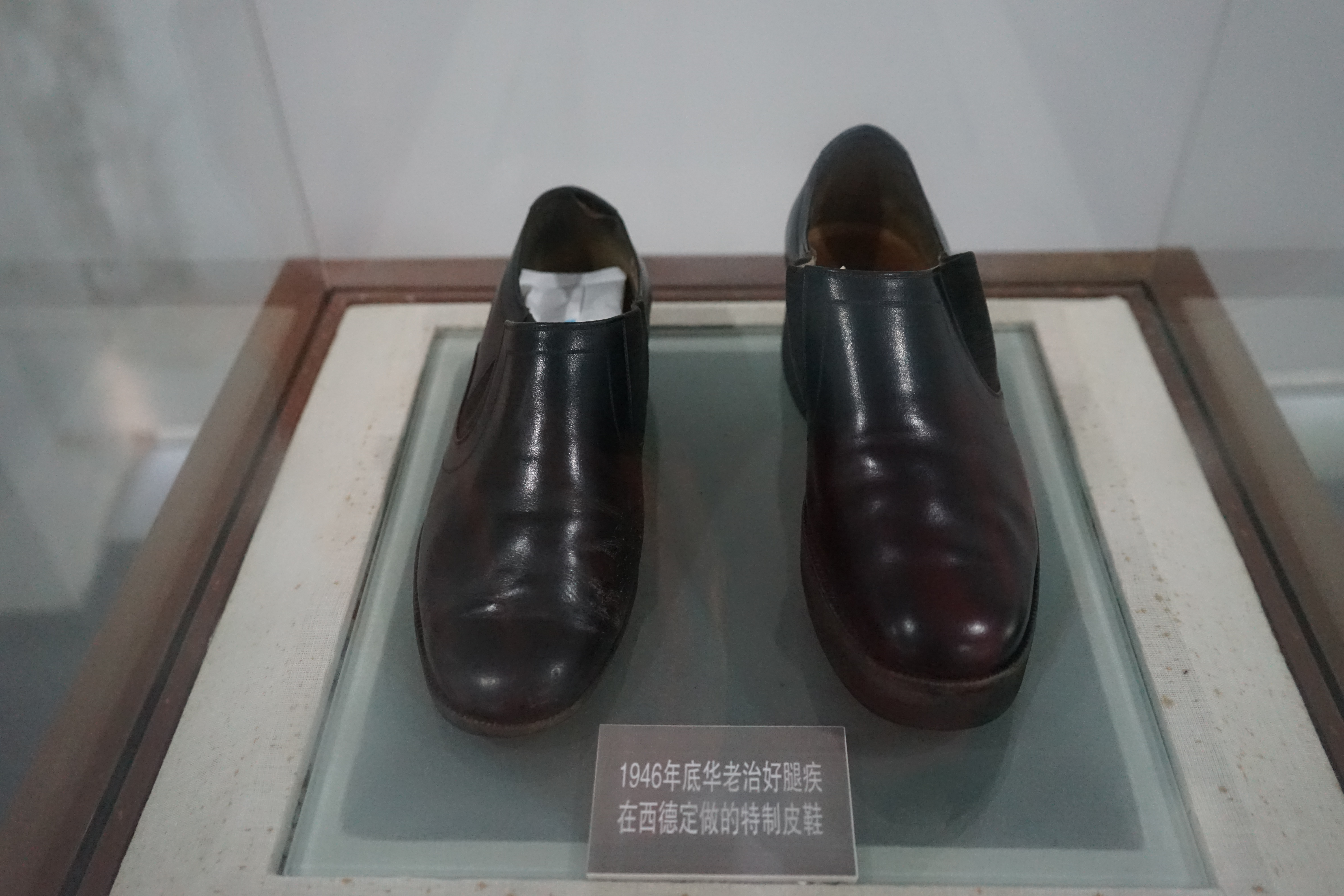 custom-made shoes Hua Luogeng bought in West Germany in 1946. Hua Luogeng Memorial Museum.